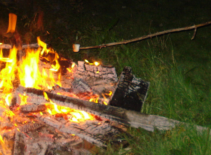 guimauve grillée au feu de bois au québec